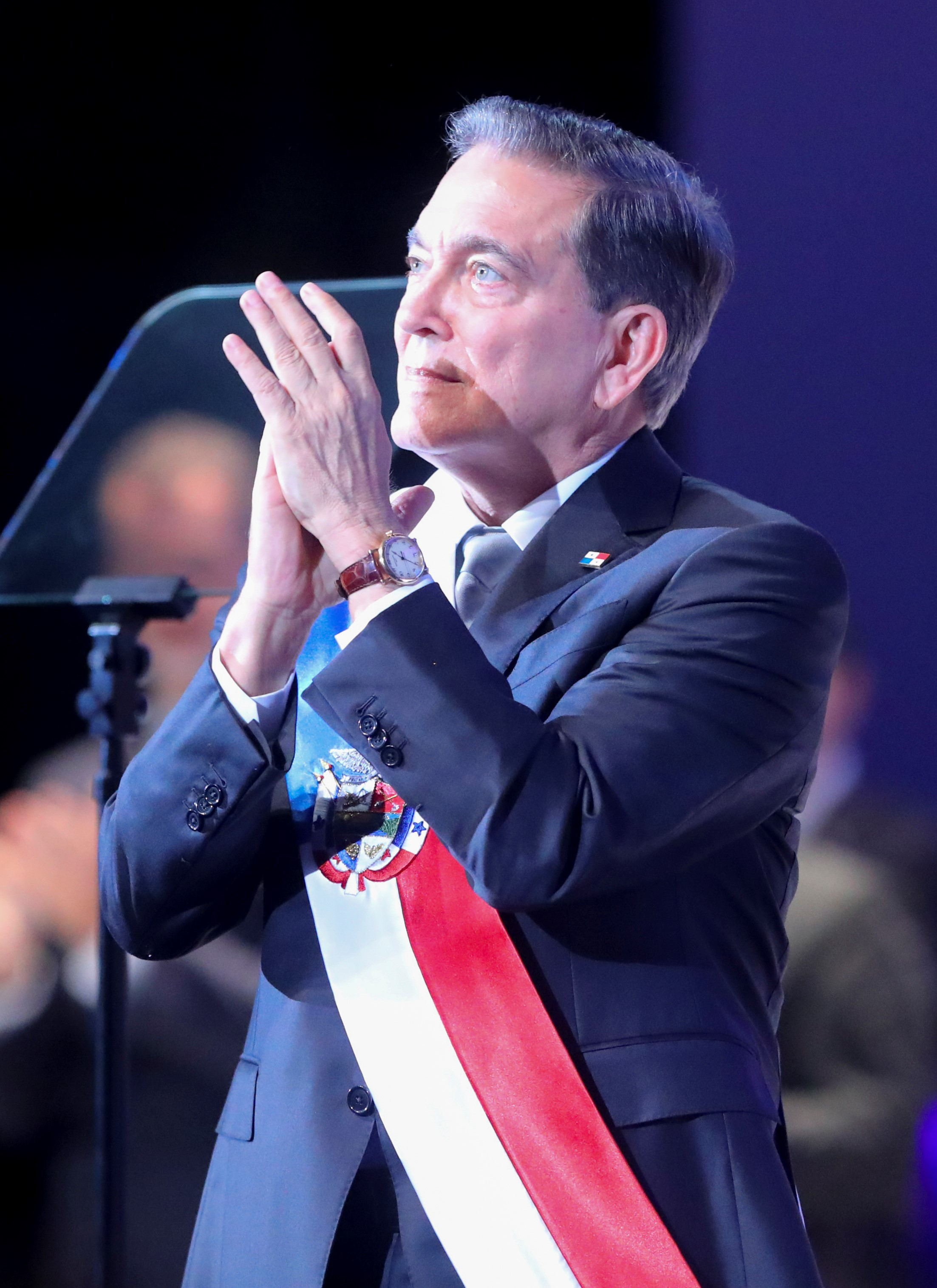 Toma de posesión de Laurentino Cortizo Cohen